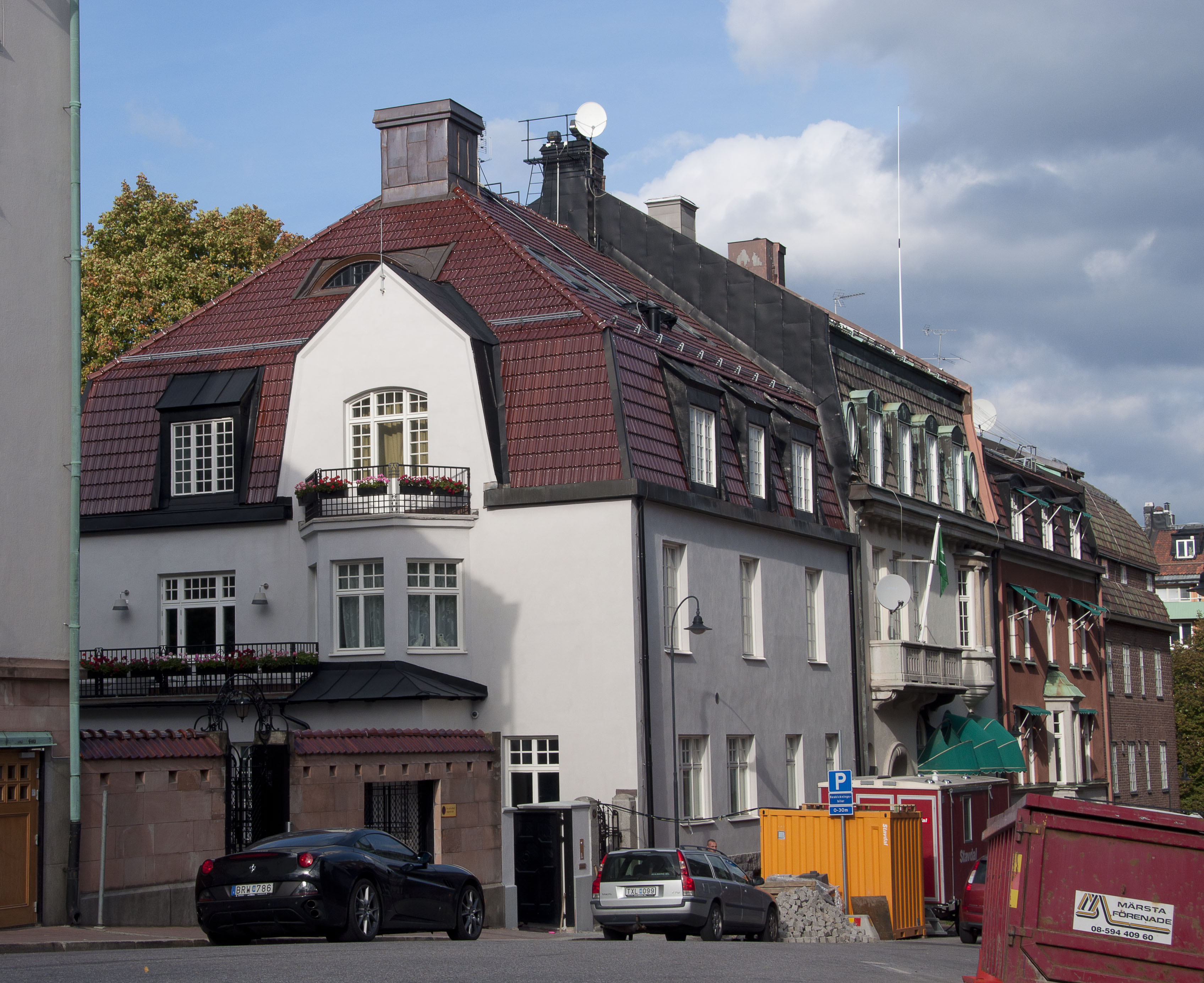 Sköldungagatan 3. Arkitekt Thor Thorén 1909-1910